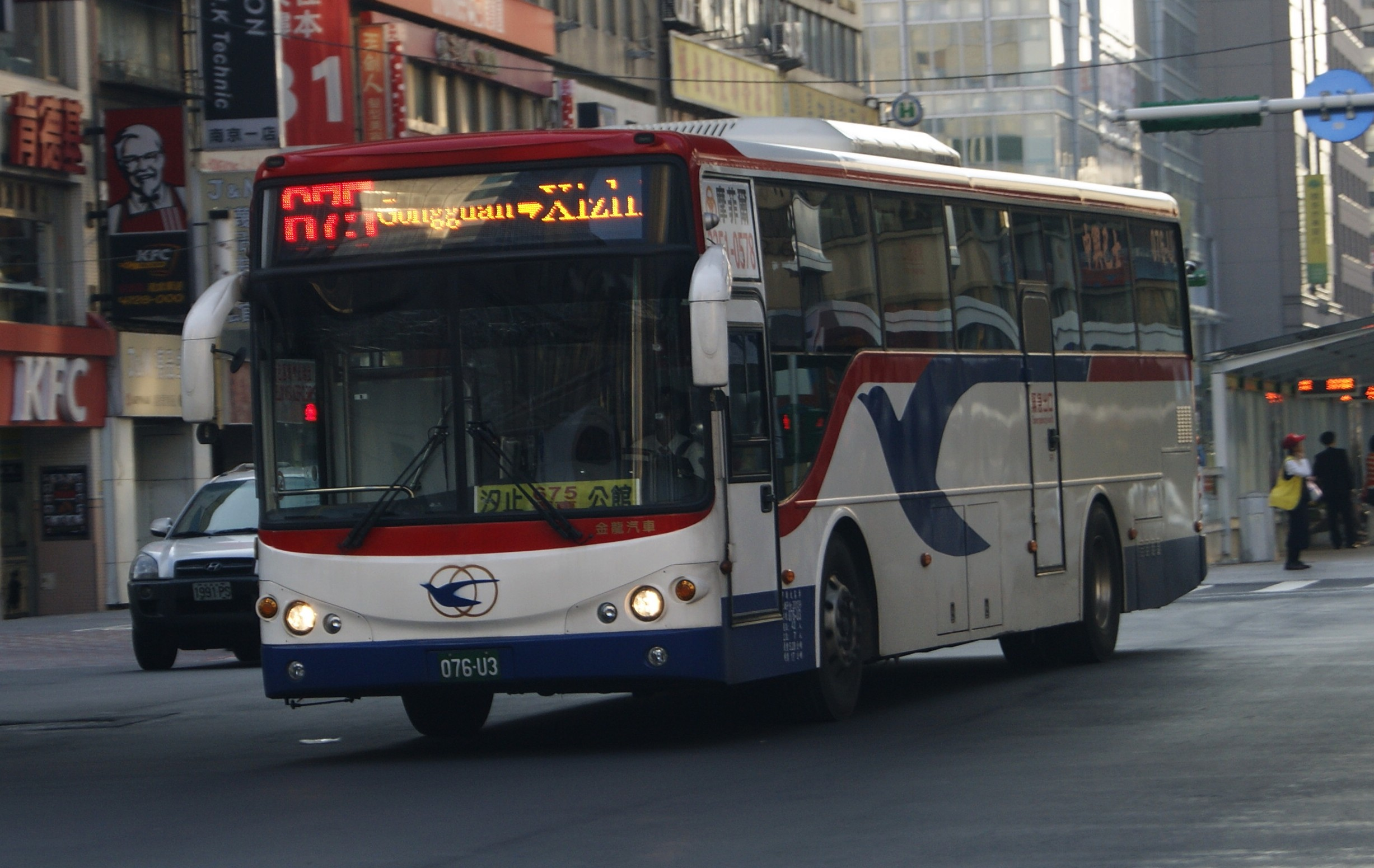 中興巴士2013金龍高巴 KINGLONG KL6120UH5